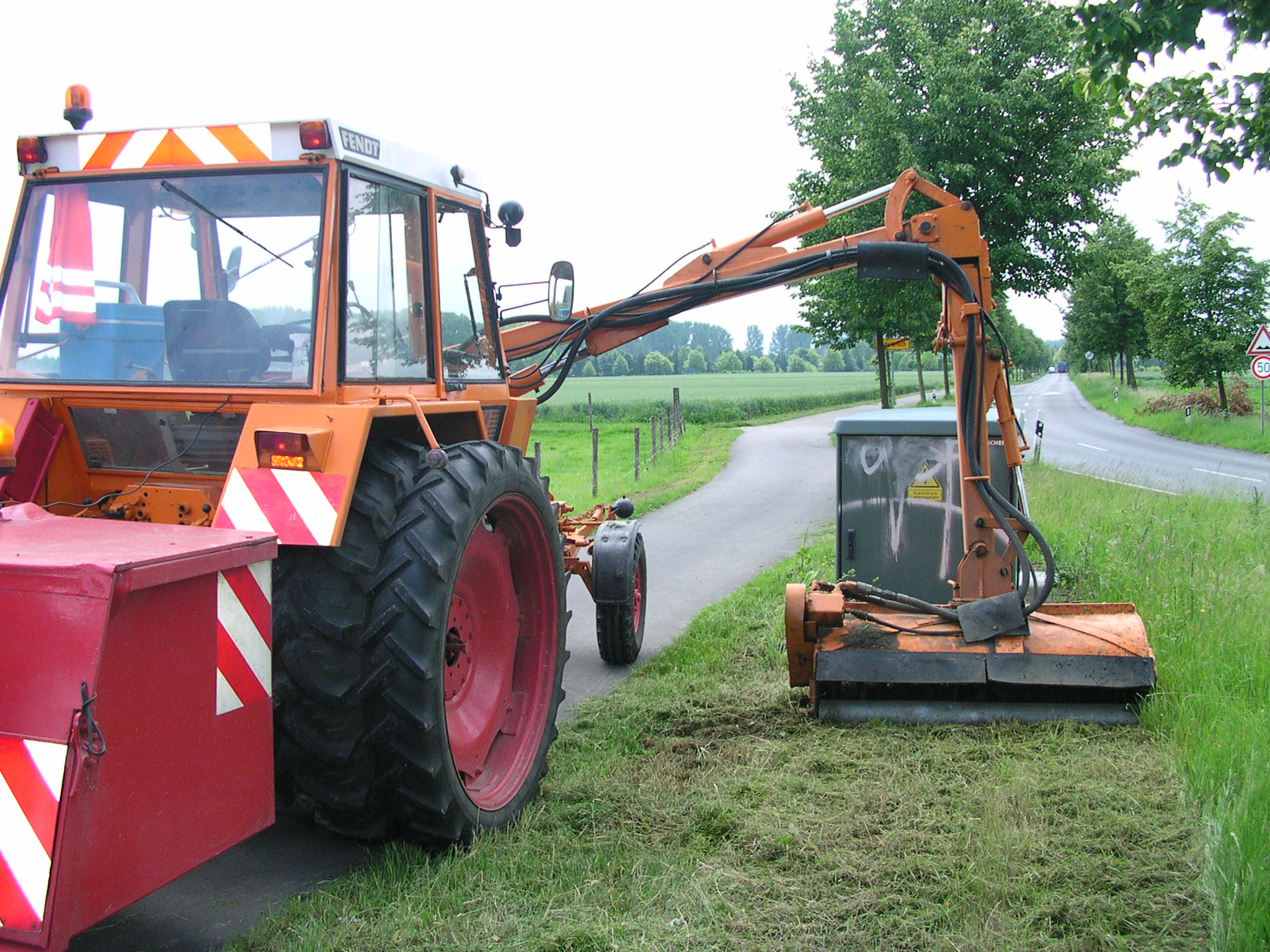 Fendt-Geräteträger (F275 GT?), Kommunalvariante mit Mulchkopf am Hydraulikausleger